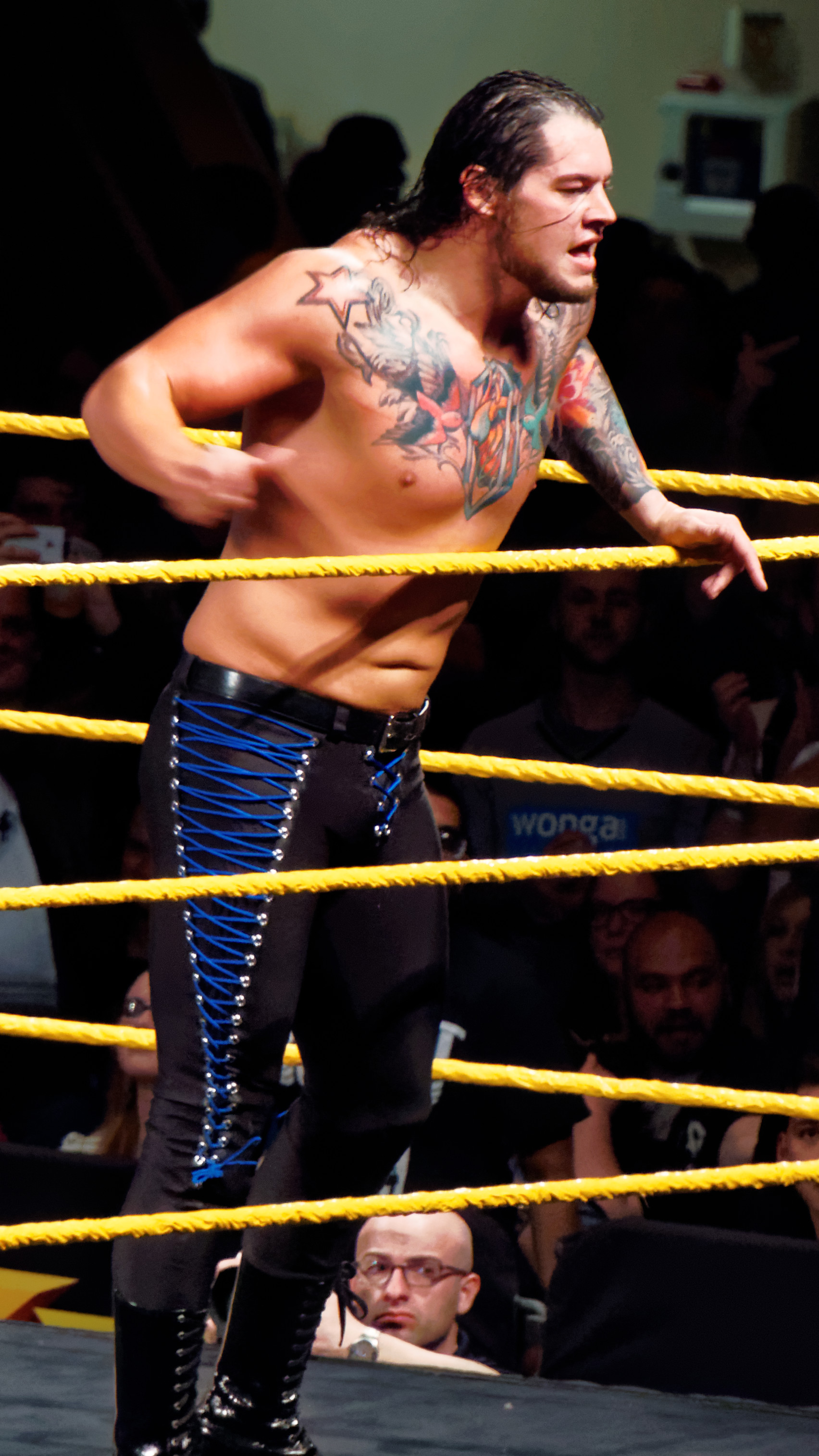 2015-03-27_23-22-23_ILCE-6000_3603_DxO